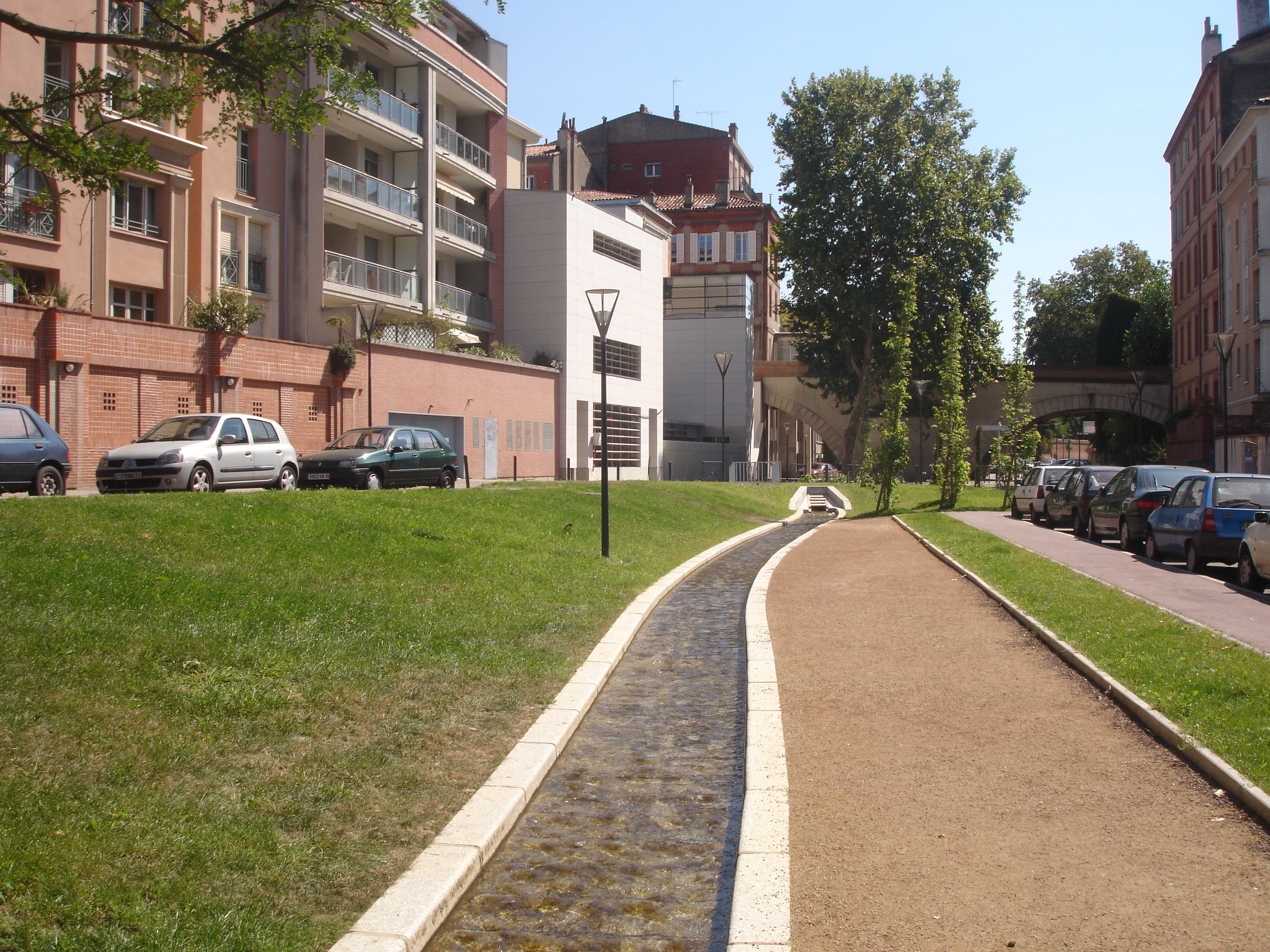 France, Haute-Garonne, Toulouse : Le pont de Tounis et l'avenue de la Garonnette.